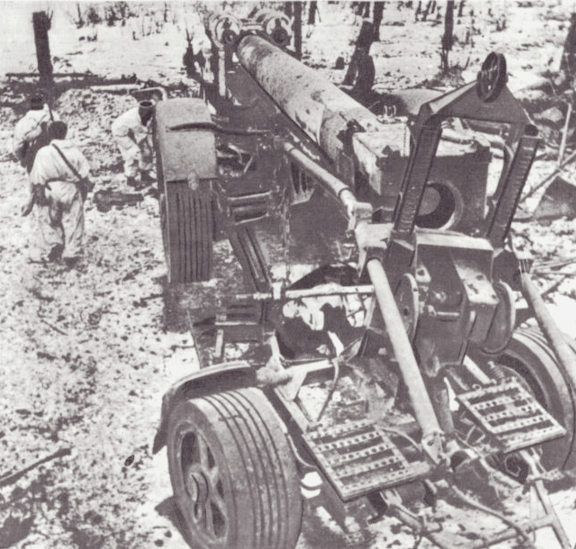 Захваченное дальнобойное орудие, обстреливавшее Ленинград с высоты Вороньей горы. 19 января 1944 год.